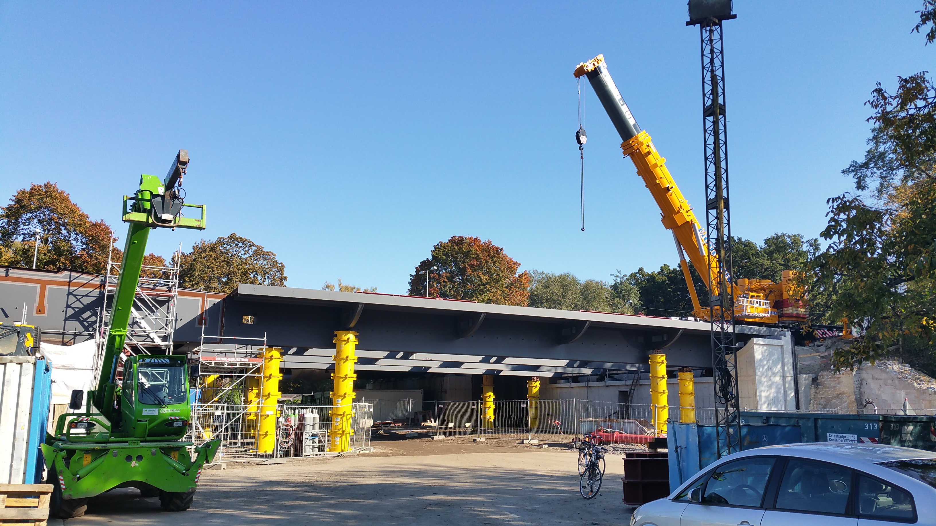 Vorbrücke der neuen Freybrücke während der Vormontage. Östliches Ufer.